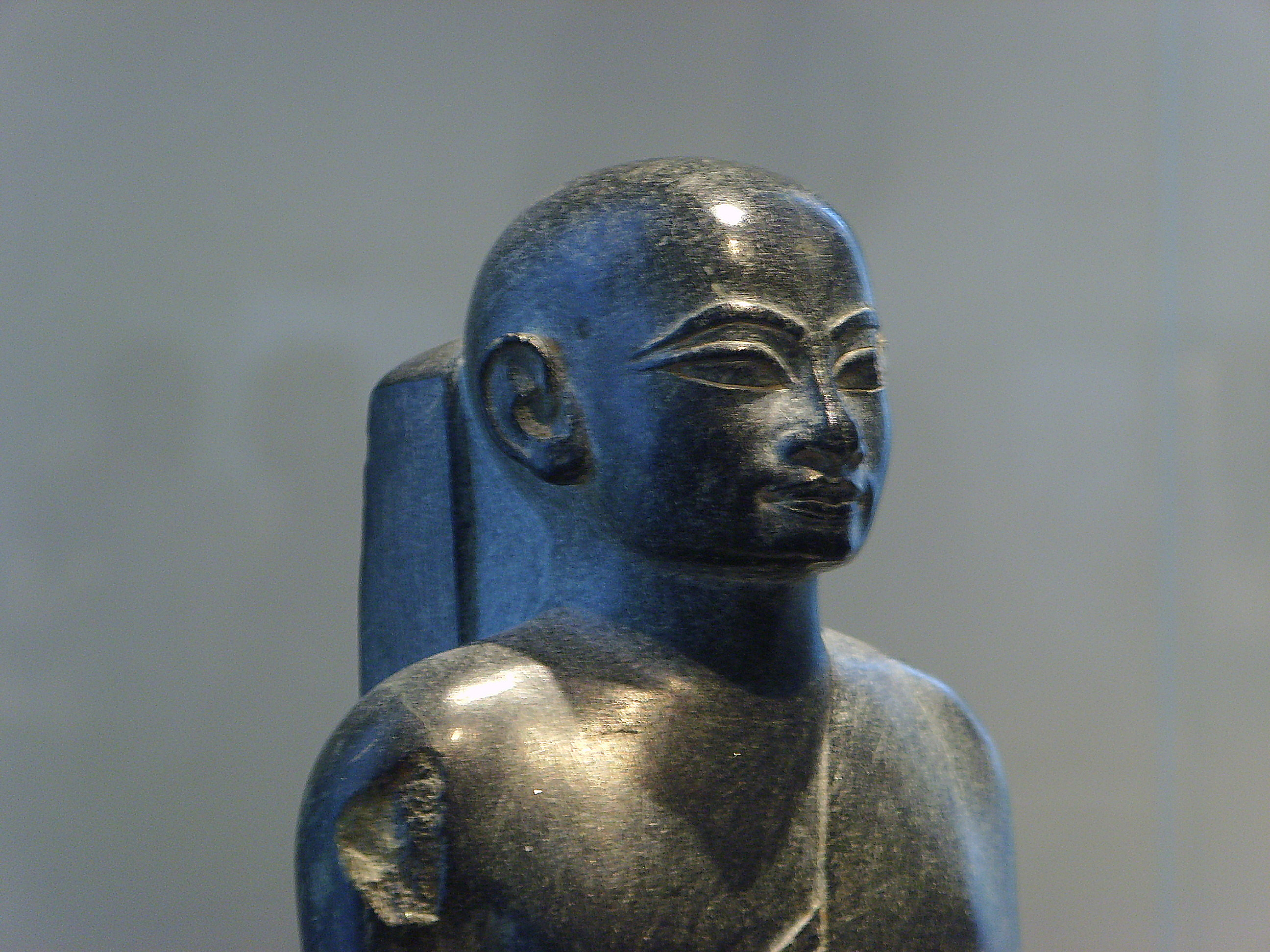 Der Priester Tai-tai (Detailansicht) Tai-tai, the priest (Head only) Ägypten, Neues Reich, 18. Dynastie, um 1380 Staatliche Museen zu Berlin - Preußischer Kulturbesitz, Ägyptisches Museum source: own work author: Gerbil